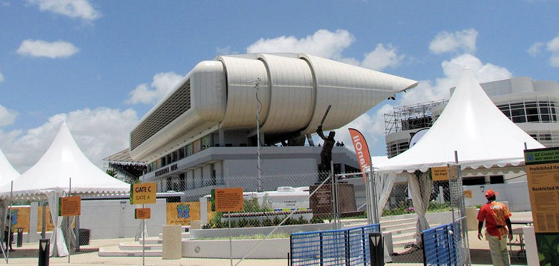 Kensington Oval stands